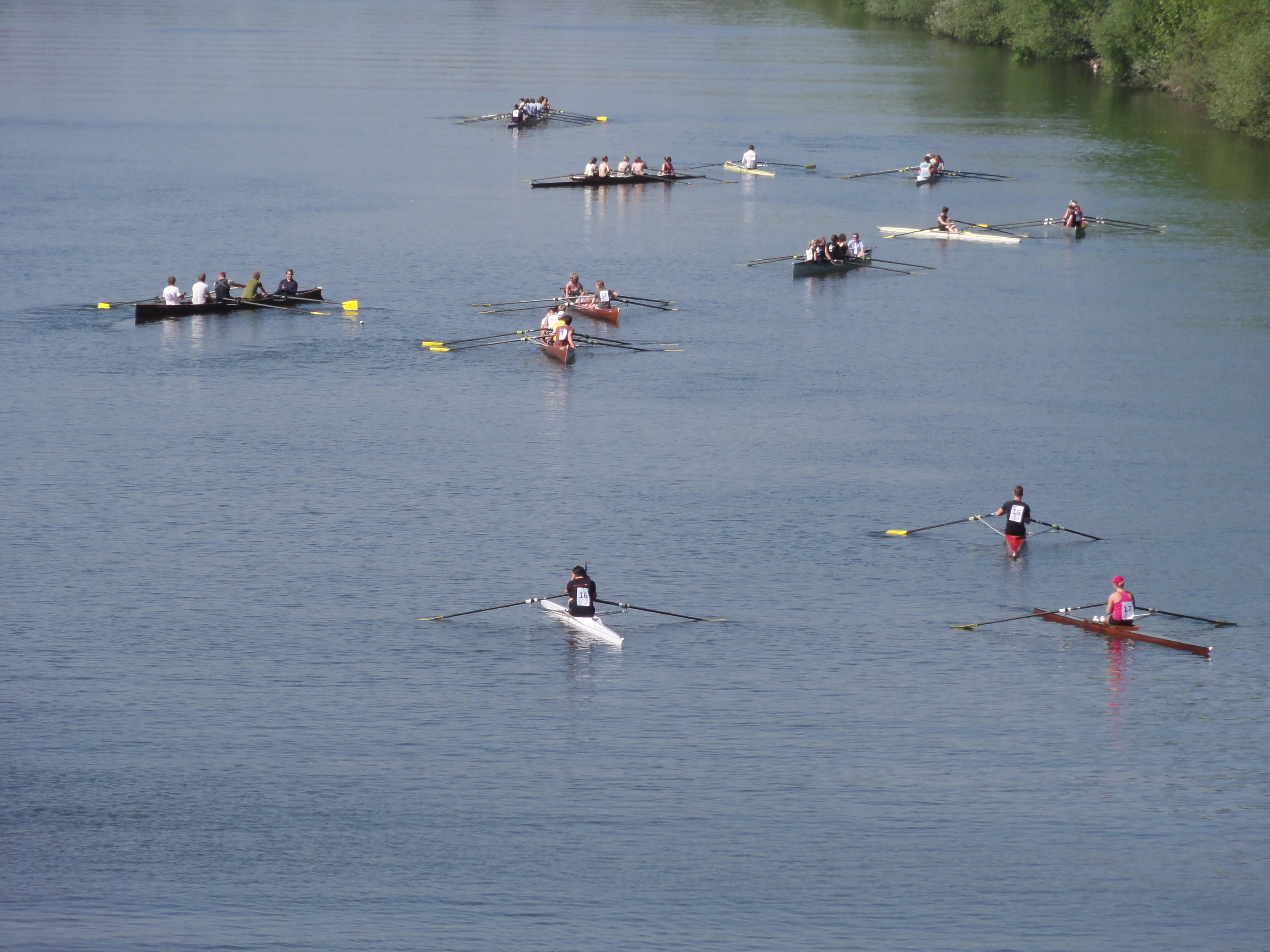 Nijmegen, Phocas roeivereniging Paasdrukte met boten op Maaswaalkanaal.